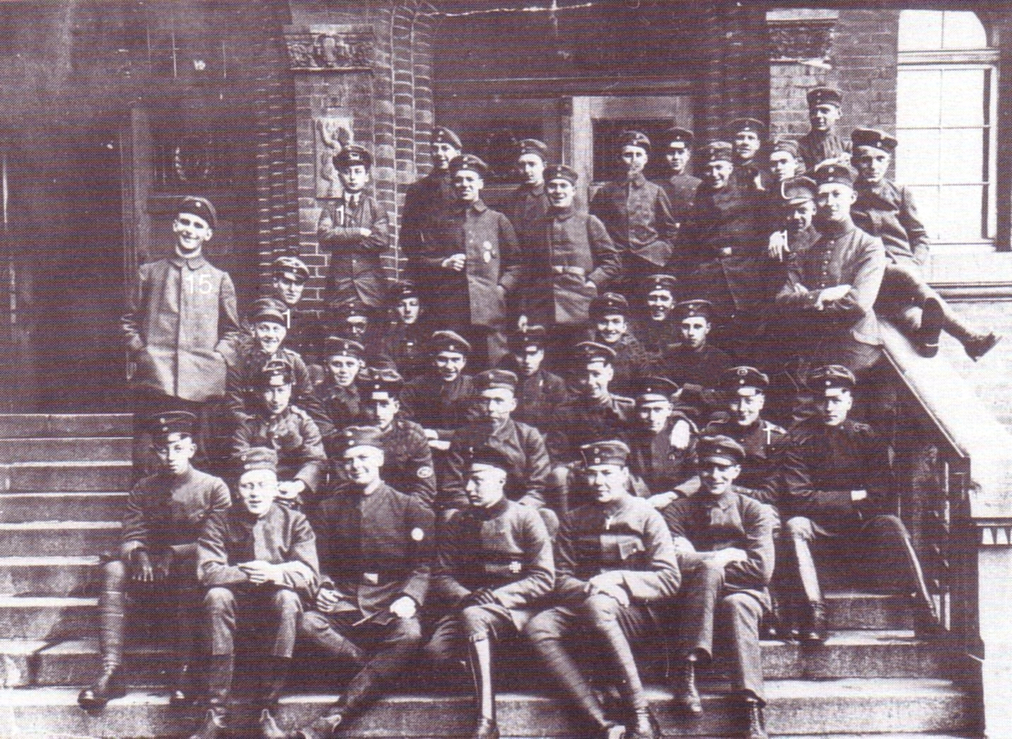 Fotografie von Zeitfreiwilligen des Hallenser Senioren-Convents vor der Oberrealschule Halle am 15. März 1920.